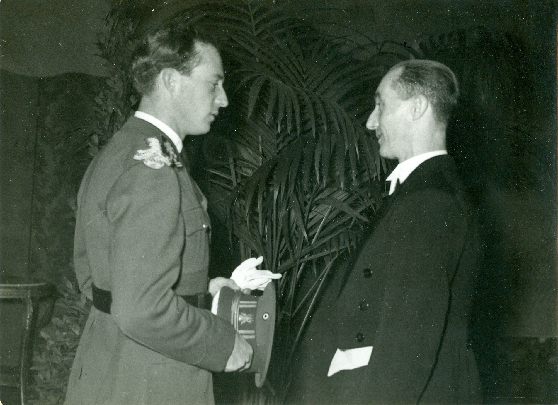 Présente le marquis Robert de Wavrin en discussion avec le roi Léopold III